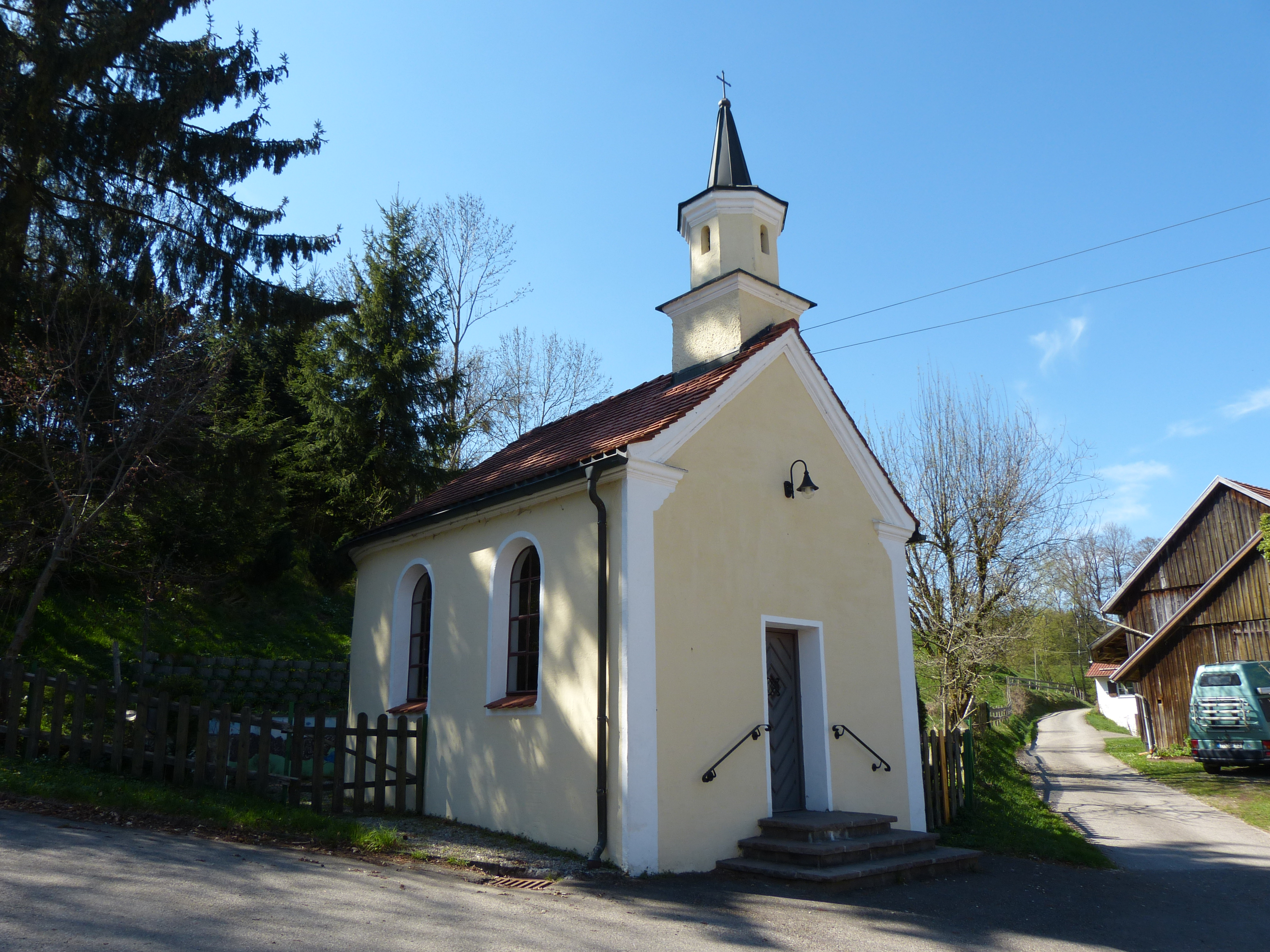 St. Anna in Wipfel, Landkreis Unterallgäu, Bayern